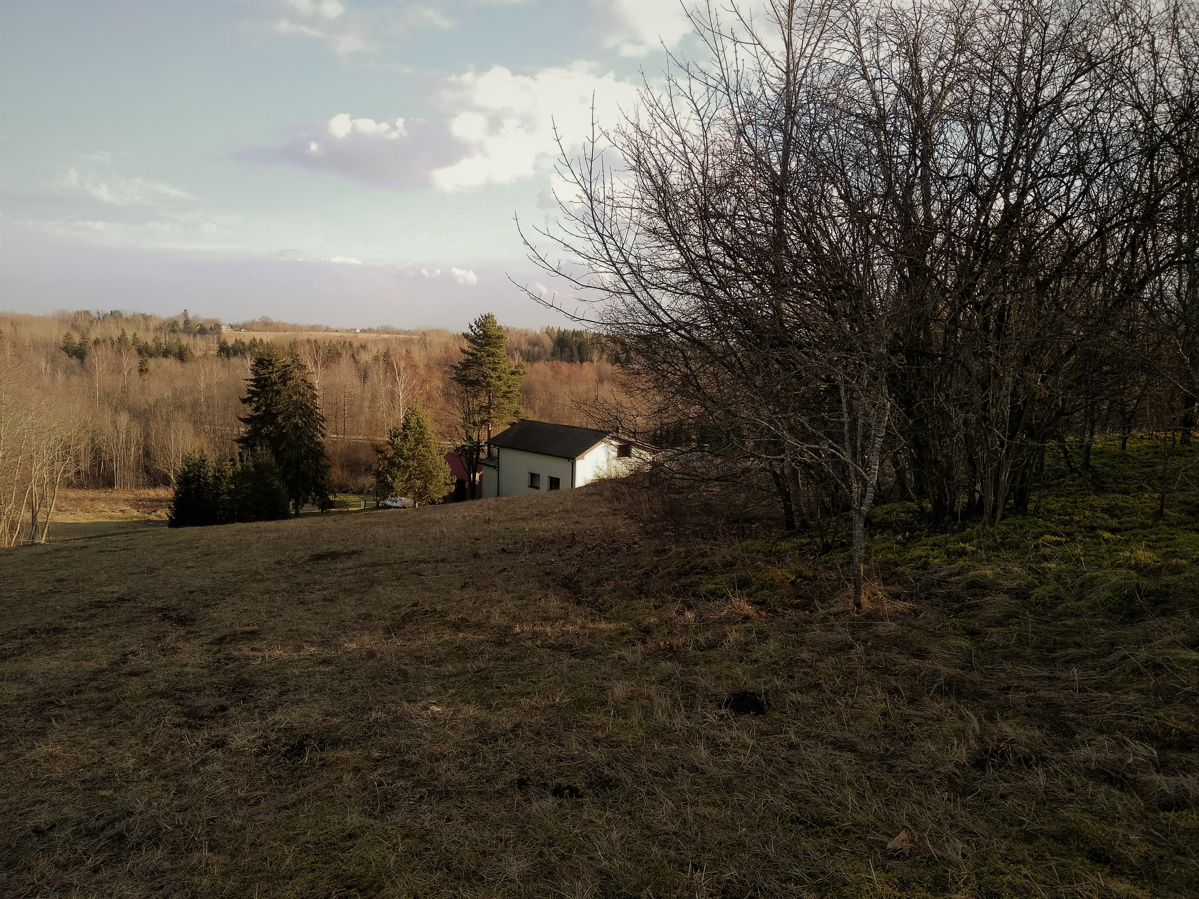 Vaade põhja suunast linnuse maa-ala kirde-idanurgale. Taamal on Kavilda (Soova) jõe ürgorg.